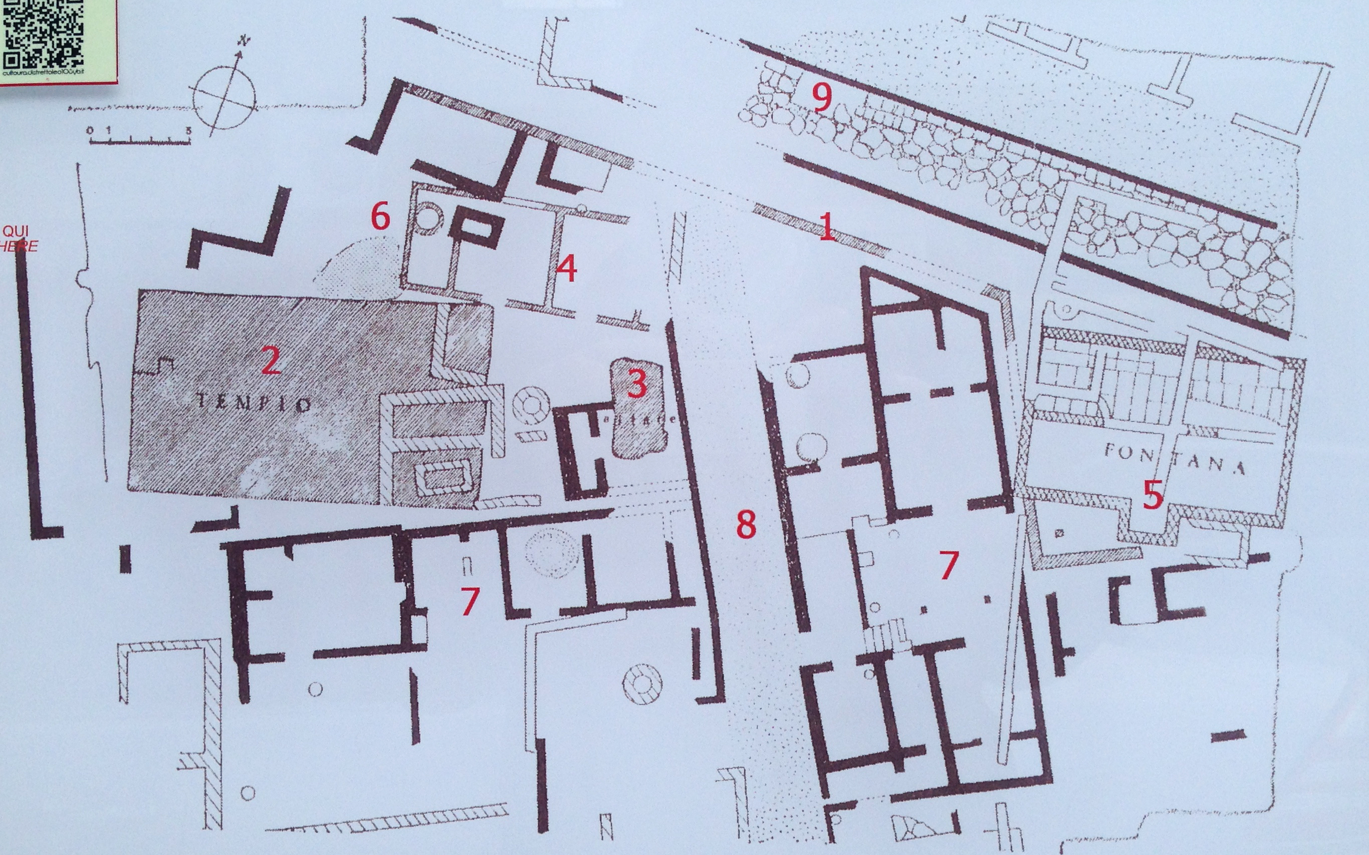 1. Temenos (area sacra) 2. Tempio 3. altare 4. vani quadrangolari 5. Fontana 6. Pozzo sacro o botros 7. Case ellenistiche e romane 8. stenopos 9. strada